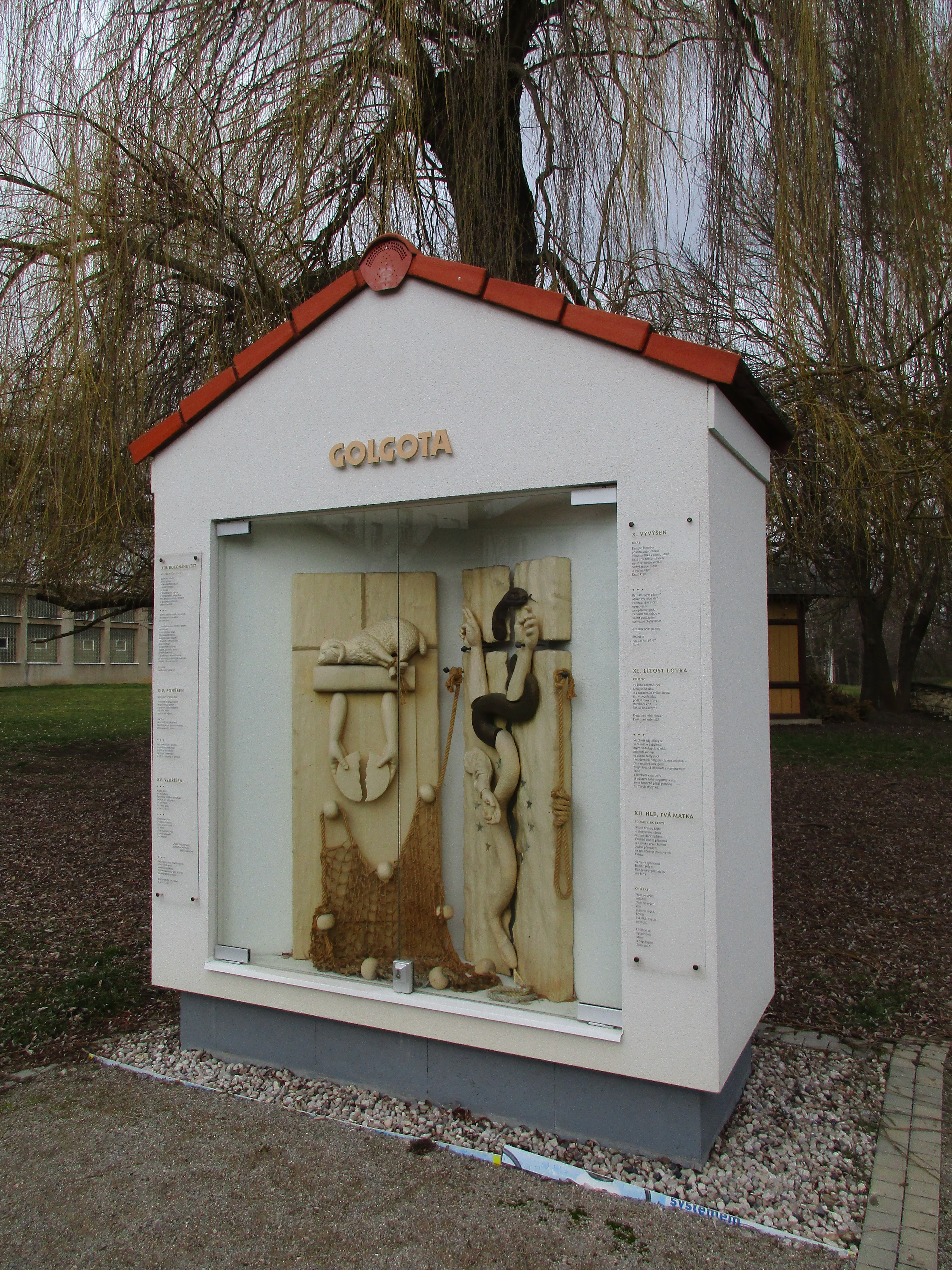 Křížová cesta Praha, Řepy 007